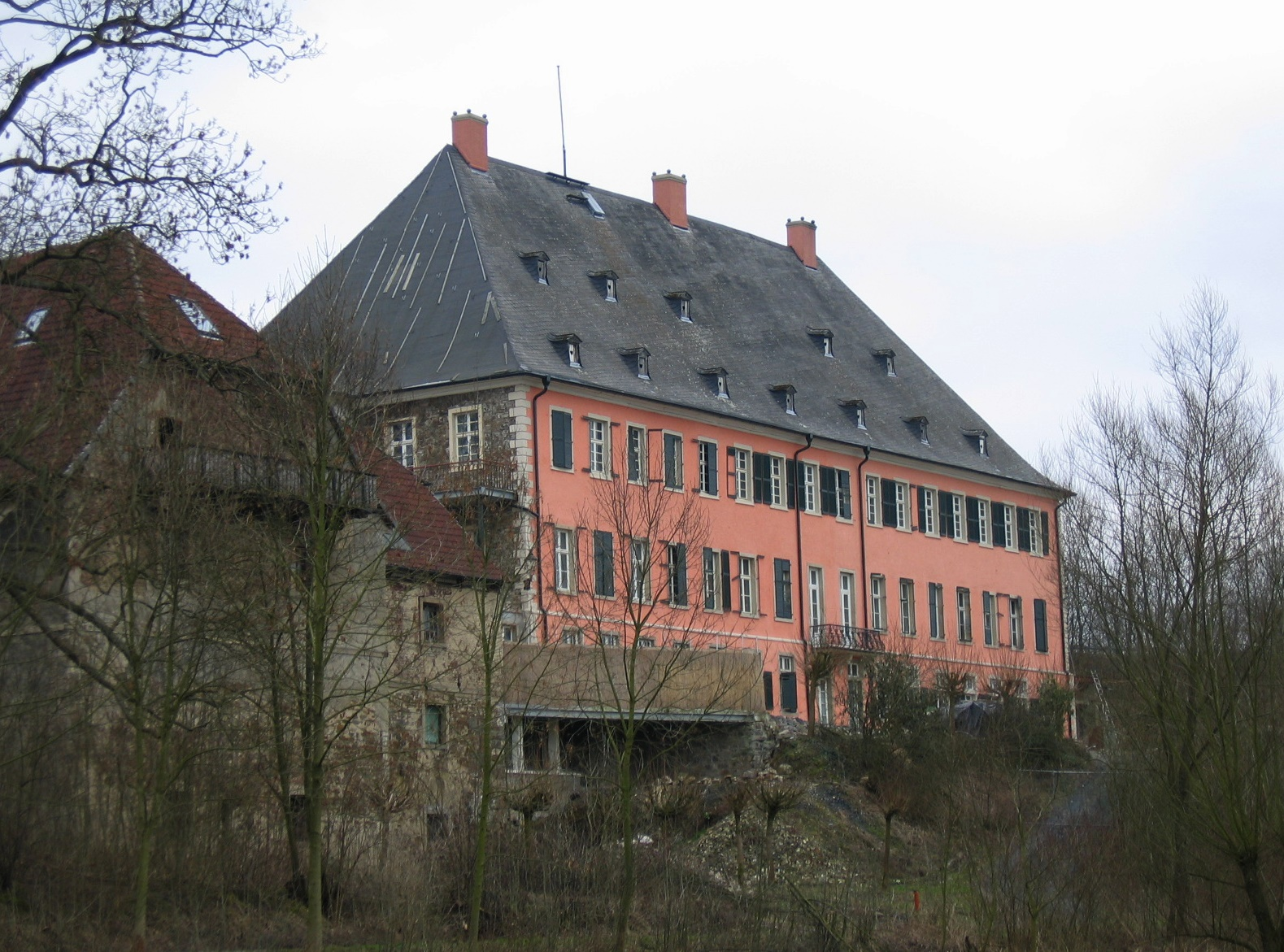 Restauriertes Schlossgebäude Haus Füchten (Privatbesitz) im Ortsteil Hünningen der Gemeinde Ense.